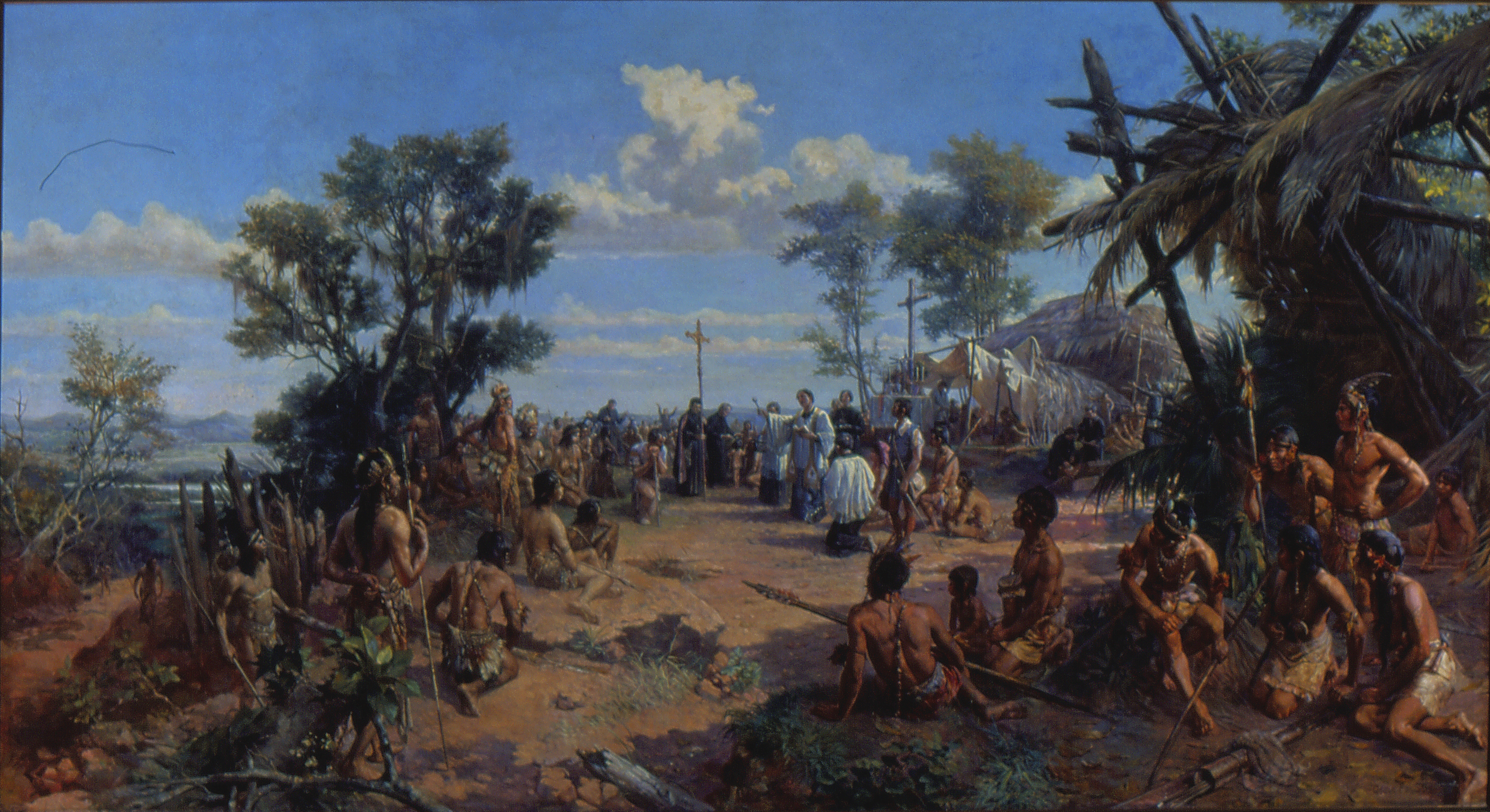 Obra que integra o acervo do Museu Paulista da USP. Coleção Fundo Museu Paulista - FMP